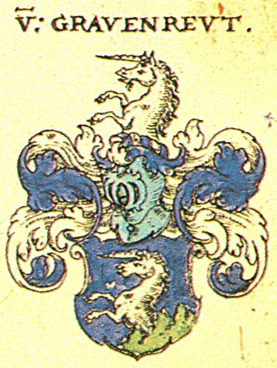 Wappen der Familie von Gravenreuth aus Siebmachers Wappenbuch, 1605, Blatt 95, 10.